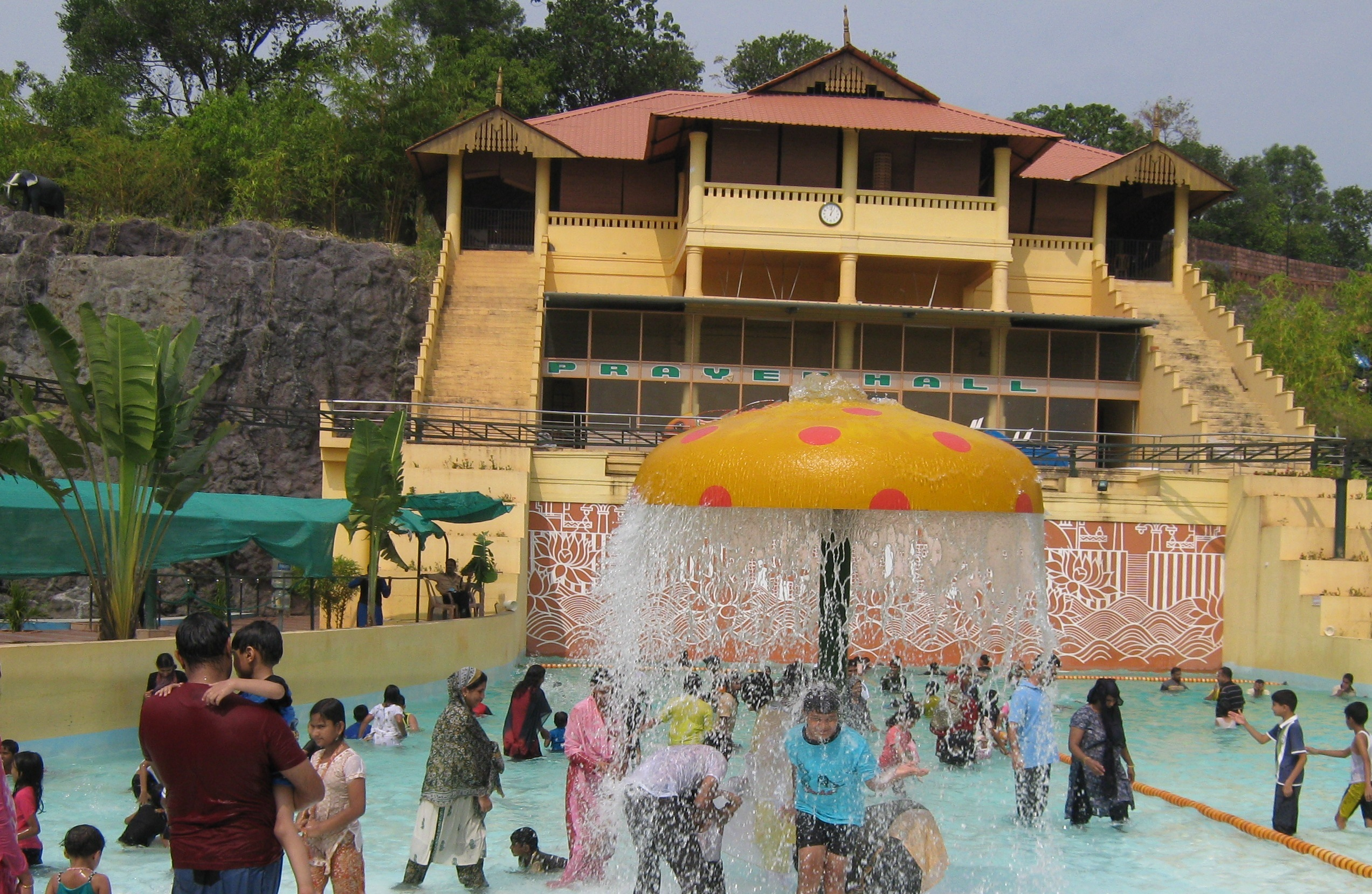 Parassinikkadavu, Kannur, Kerala, India.